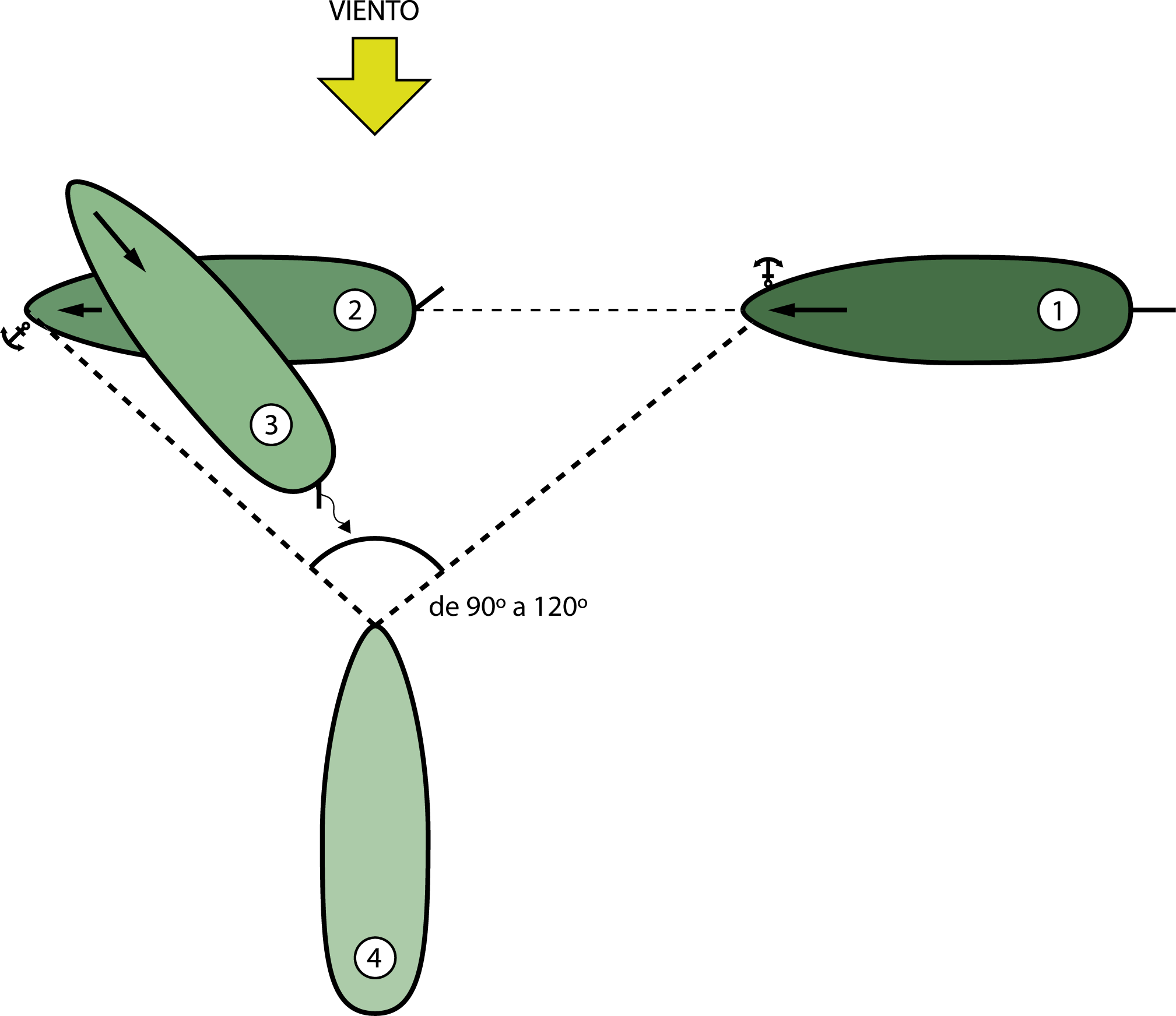 Fondear a barbas de gato.